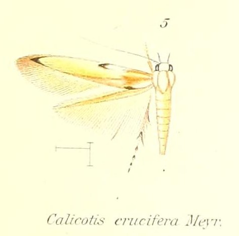 Calicotis crucifera